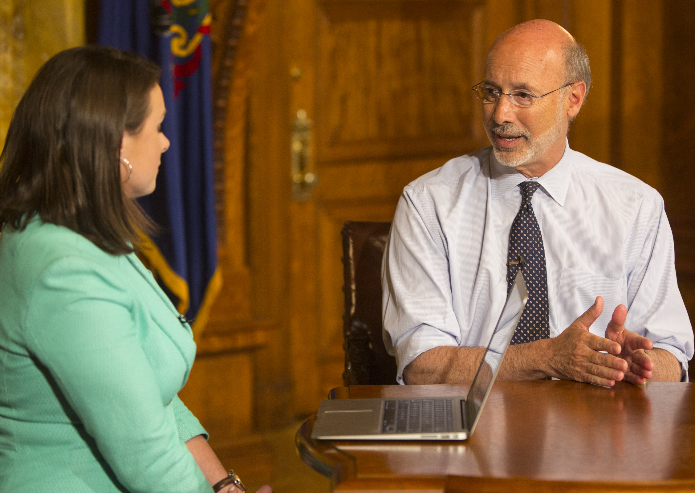 June 2, 2015 Harrisburg, PA